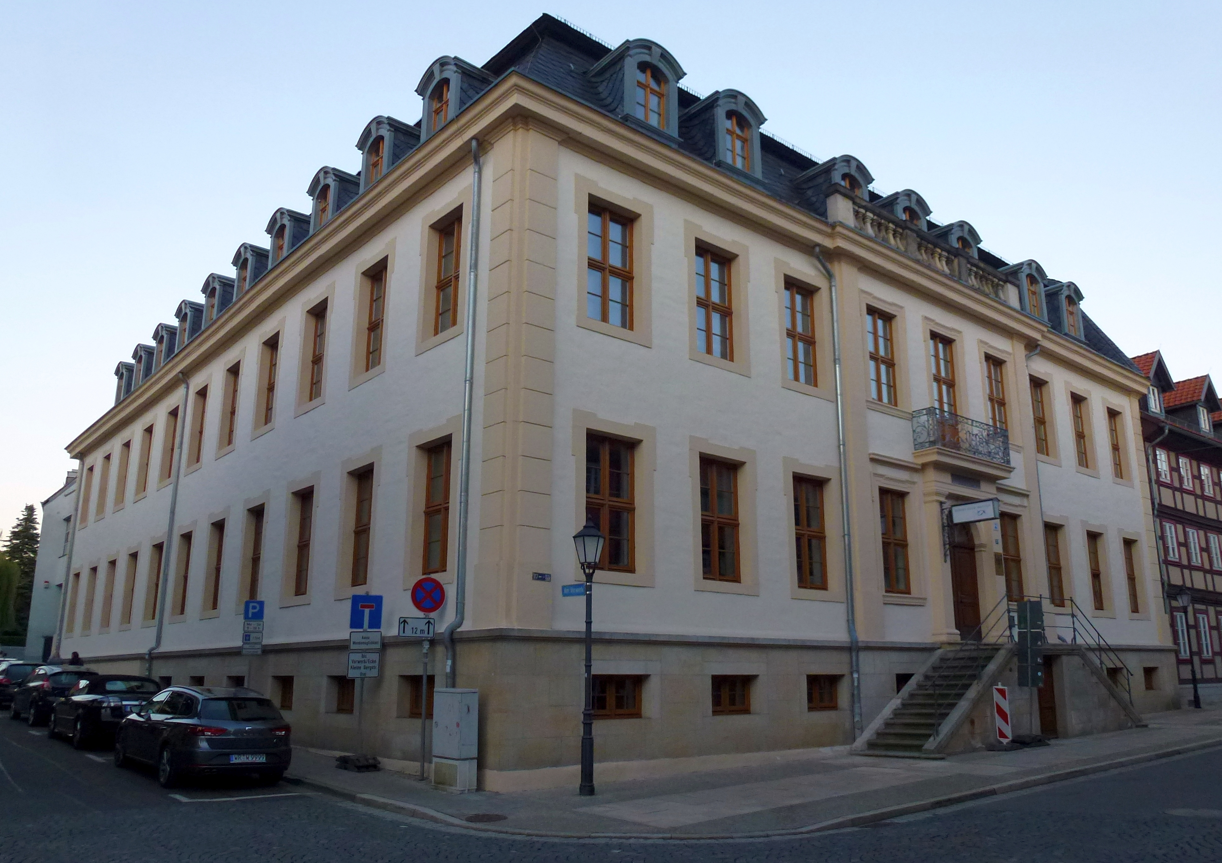 Robert-Koch-Institut in der Burgstraße 37 in Wernigerode. Nach dem Stadtbrand von 1751, der ein dort stehendes Fachwerkhaus vernichtete, wurde 1754 ein neues Gebäude errichtet. Es diente als Bürgermeister- und Regierungsgebäude, als fürstliches Konsistorium, Fürst-Otto-Museum und NSDAP-Kreisleitung. Seit 1946 wurde es als Bakteriologisches Institut genutzt, später Hygieneinstitut und heute Robert-Koch-Institut.